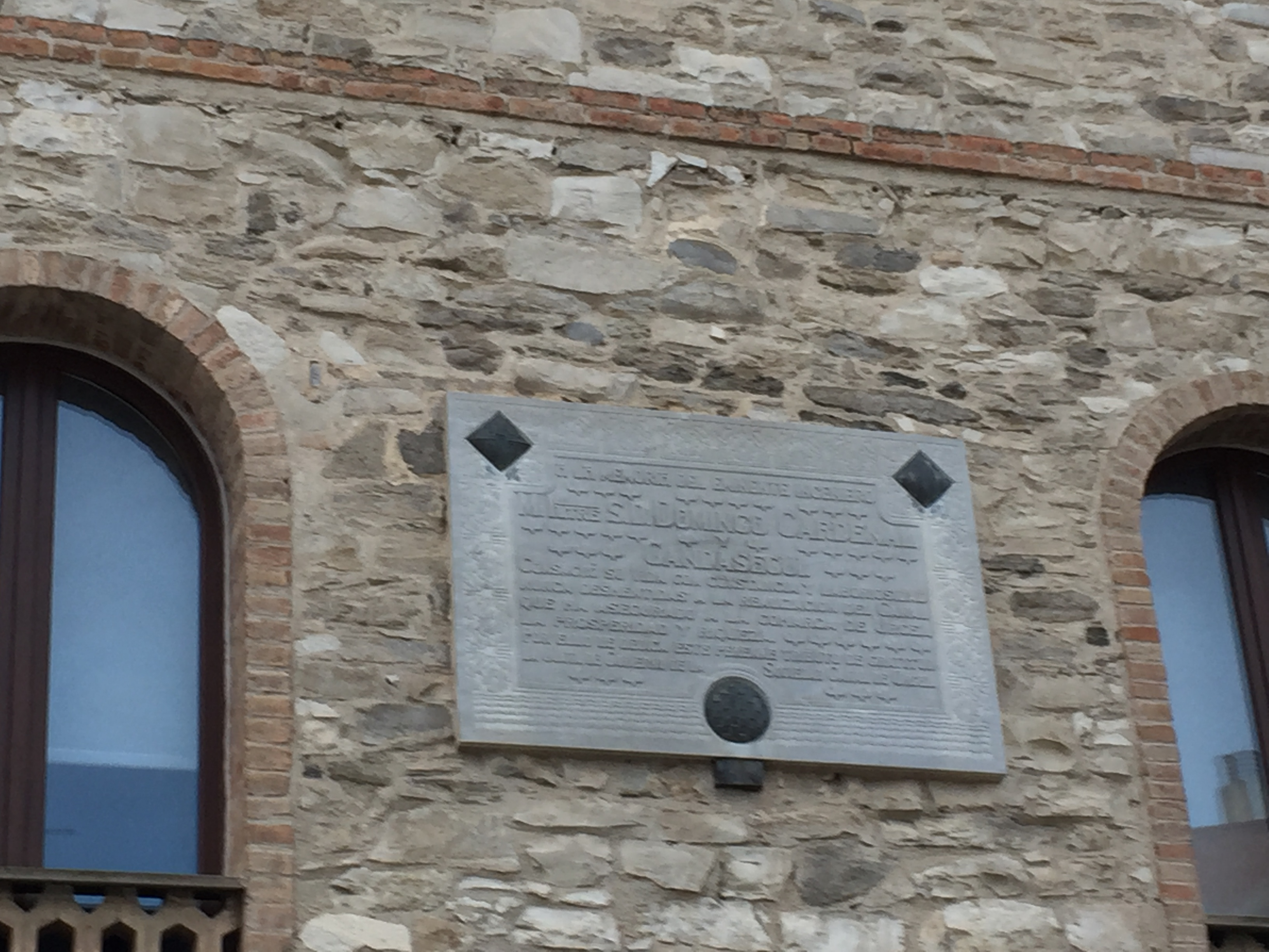 Placa commemorativa dedicada a Domingo Cardenal Gandasegui, enginyer director e les obres de construcció del canal d'Urgell, col·locada per la Junta de Govern de la SA Canal de Urgel a la façana de la Casa Canal el 1901